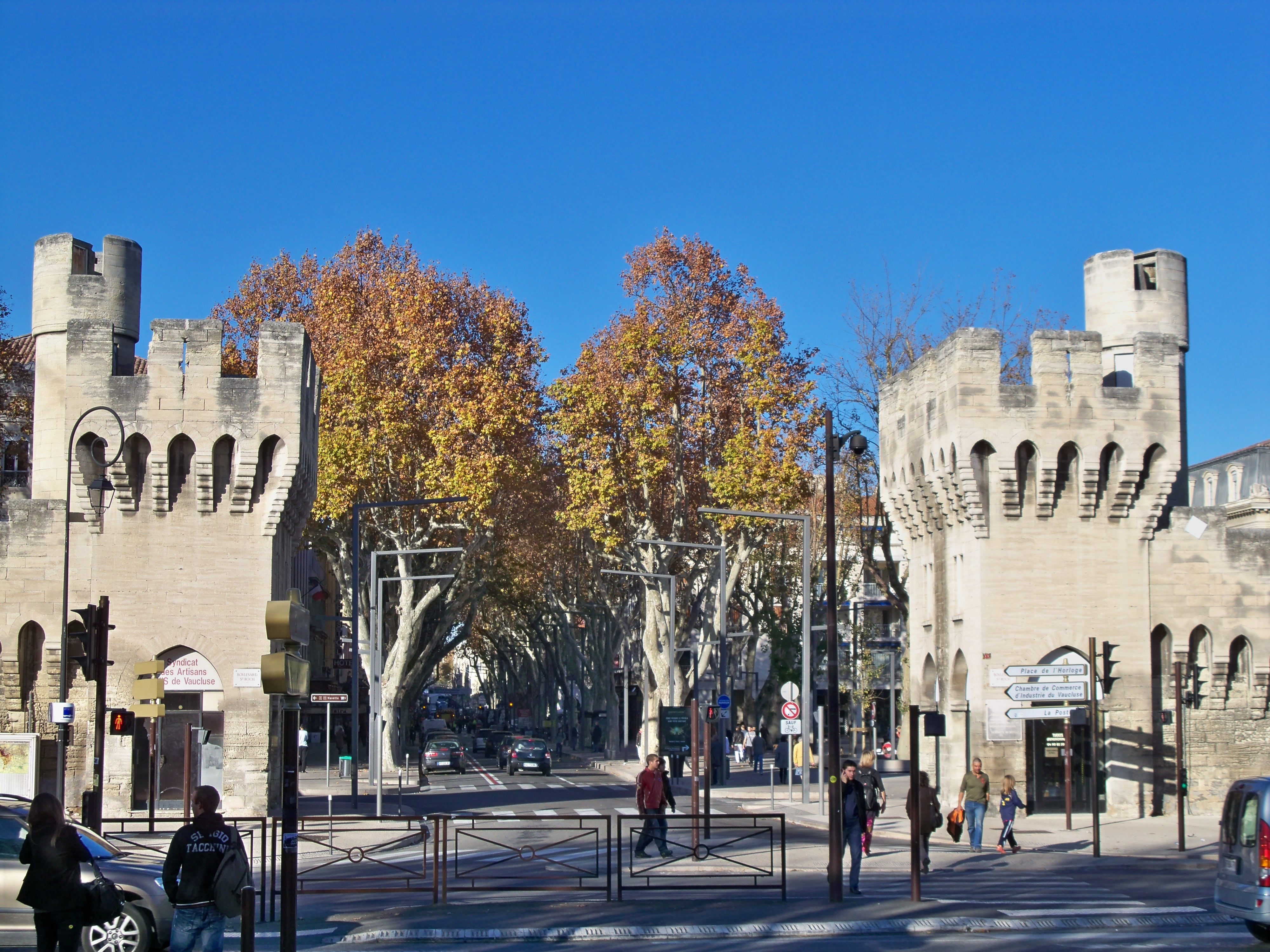 Porte de la République, à Avignon, Vaucluse, France